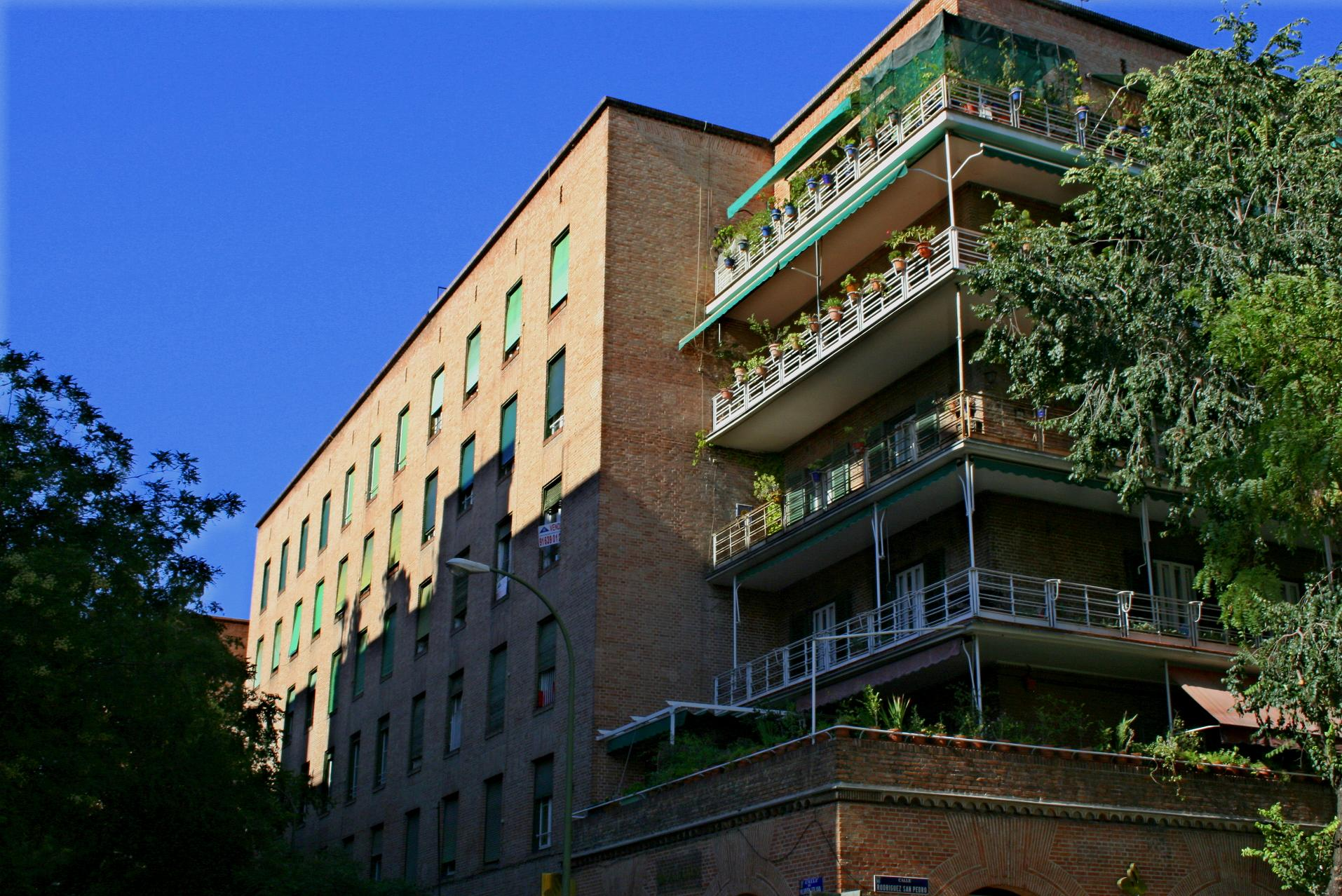 Madrilgo Casa de las Flores, Secundino Zuazo, 1930-32. Hilarión Eslava, Meléndez Valdés, Gaztambide eta Rodríguez San Pedro kaleek osatua.